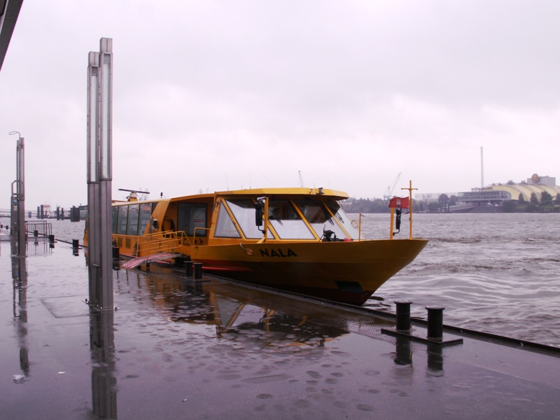 Hambg. Barkasse d. HVV